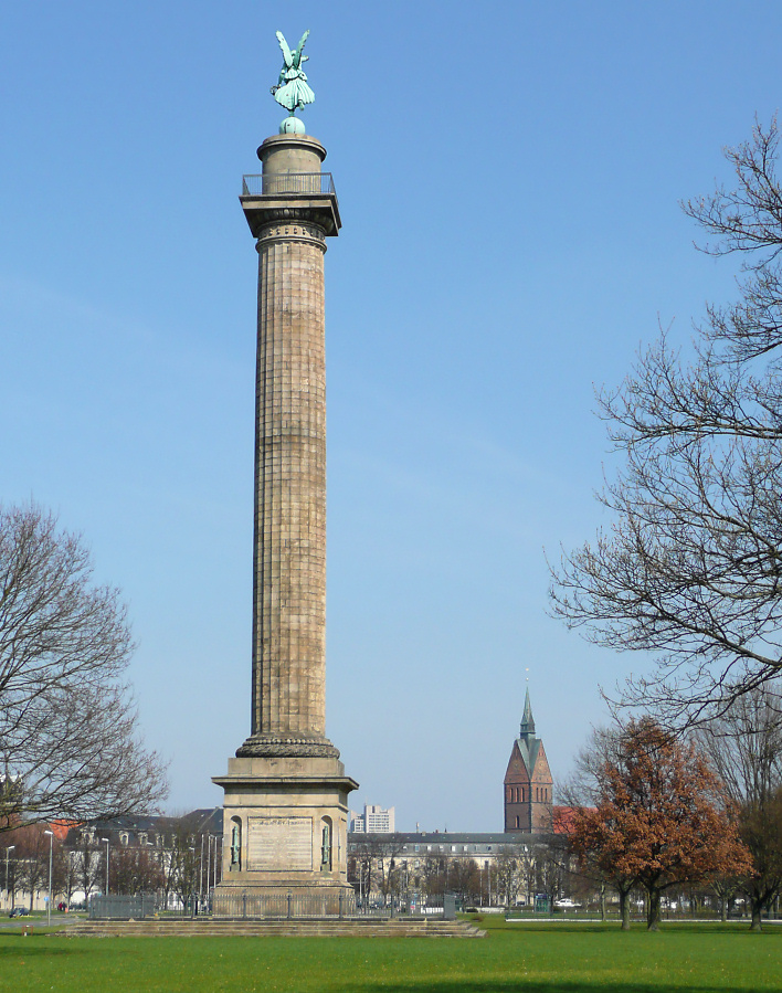 Waterloosäule